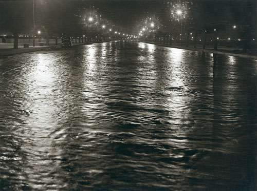 Vista nocturna de la Av. Costanera Sur en un día de lluvia.